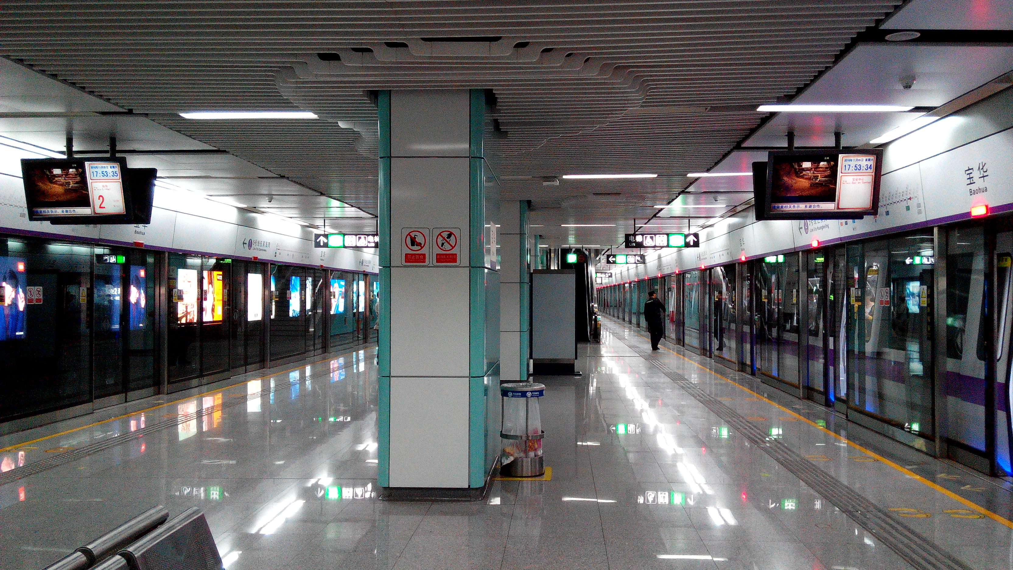 深圳地铁5号线 宝华站站台